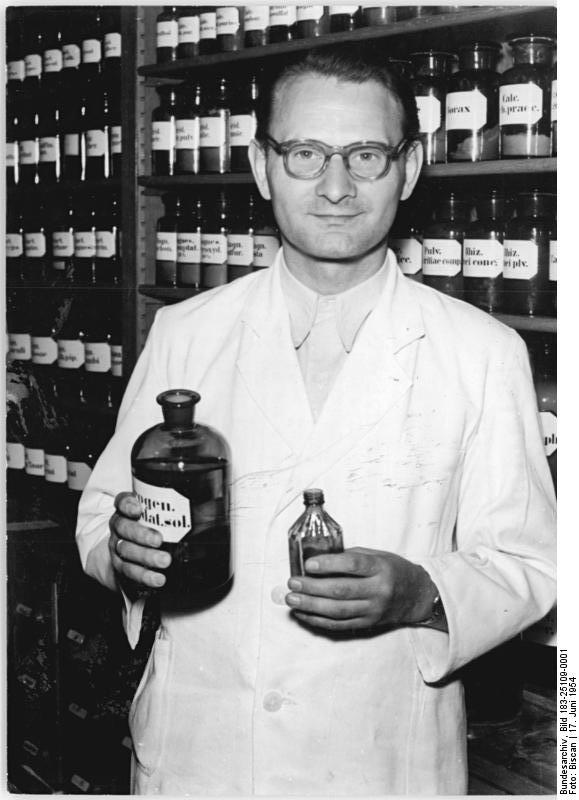 Magdeburg, Apotheke der Poliklinik, Leiter Zentralbild Biscan 2 Motive 17.6.1954 Magdeburger Werktätige begrüssen Volksbefragung "Bei der Volksbefragung gibt es für den denkenden Menschen nur eine Möglichkeit, nämlich für den Friedensvertrag um damit zugleich für die Einheit Deutschlands zu stimmen," erklärt Walter Wenzel, der leitende Apotheker der Pawlow-Poliklinik in Magdeburg. "Angesichts der amerikanischen Wasserstoffbomben-Versuche ist es erst richtig augenfällig geworden, welche Gefahren uns allen bevorstehen, wenn es zu einem dritten Weltkrieg kommt. Noch ist die endgültige Zahl der Opfer von Hiroshima nicht zu übersehen und schon sind neue Opfer durch die unverantwortlichen Versuche der USA zu verzeichnen. Da gibt es nur eine Forderung: die friedliebenden Menschen aller Völker müssen das Verbot der Atomwaffen erkämpfen. Leihweise Zentralbild